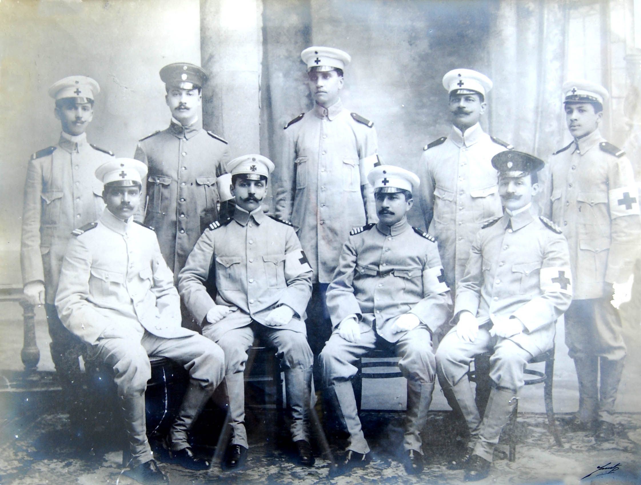 Miembros de la Primera Brigada de la Cruz Roja en Ecuador, conformada en la ciudad de Guayaquil en 1910